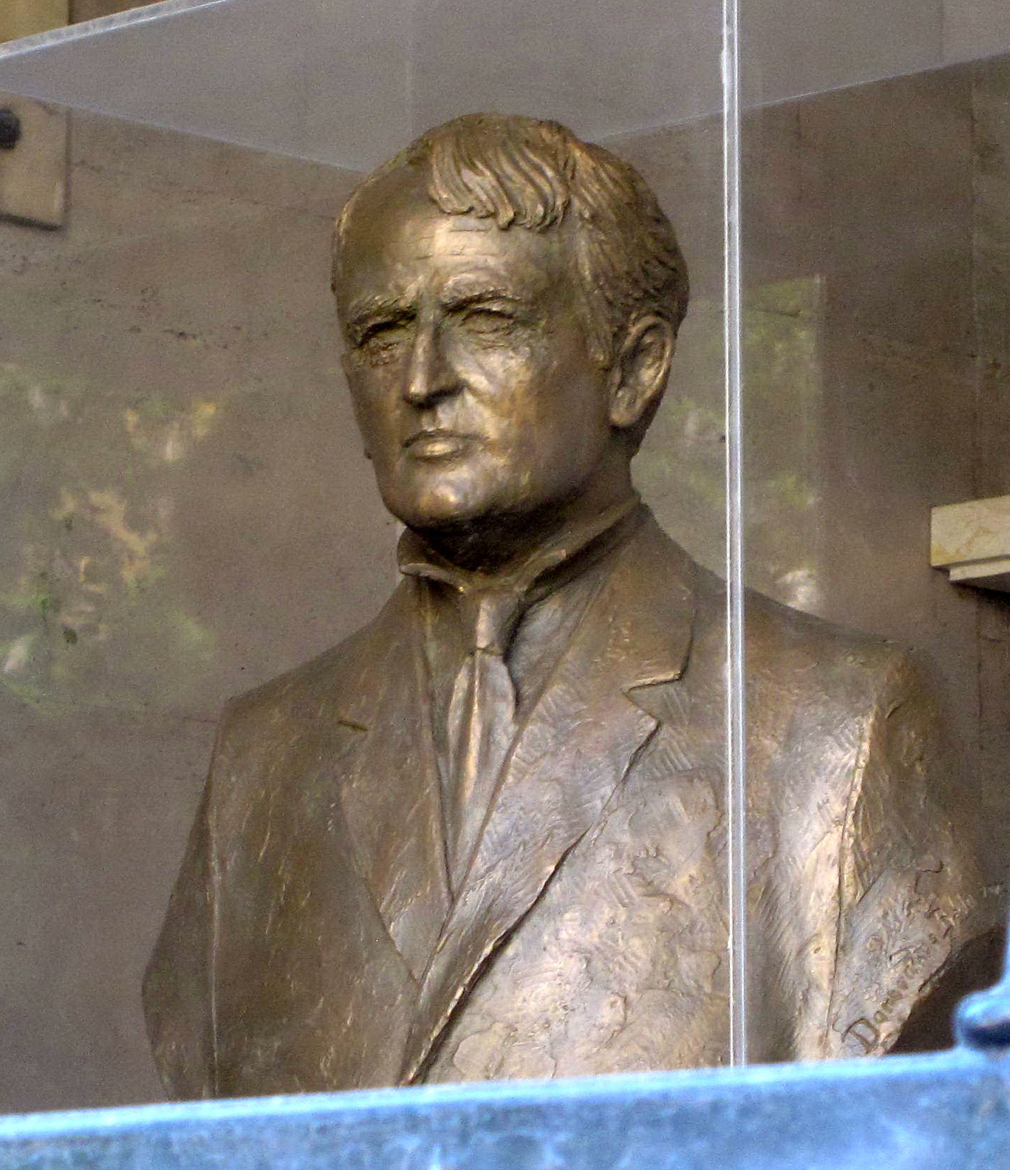 Dezső Szabó, Budapešť